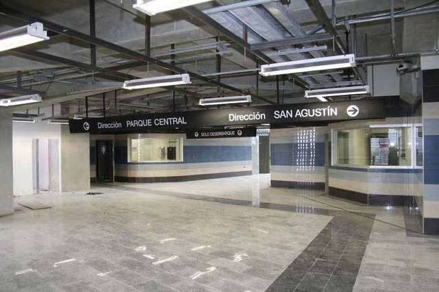 Metrocable de Caracas estacion hornos de cal 2009